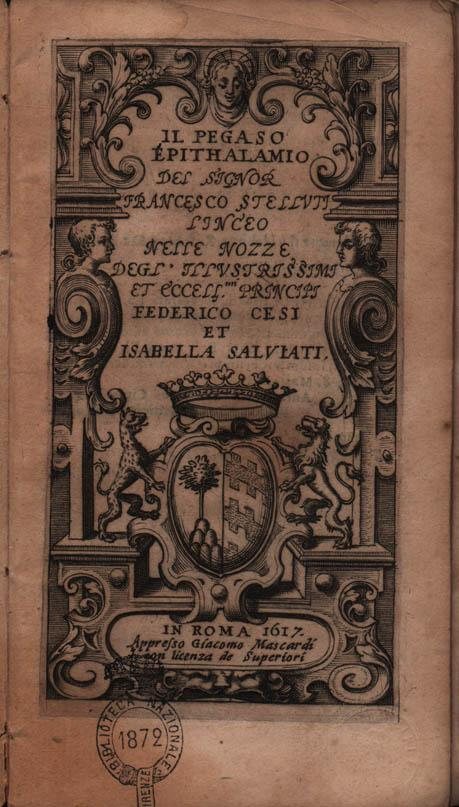 Il Pegaso: title page